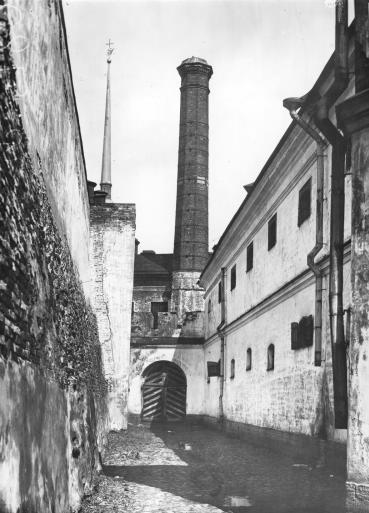 Внешний двор тюрьмы Трубецкого бастиона. Фото 1924.